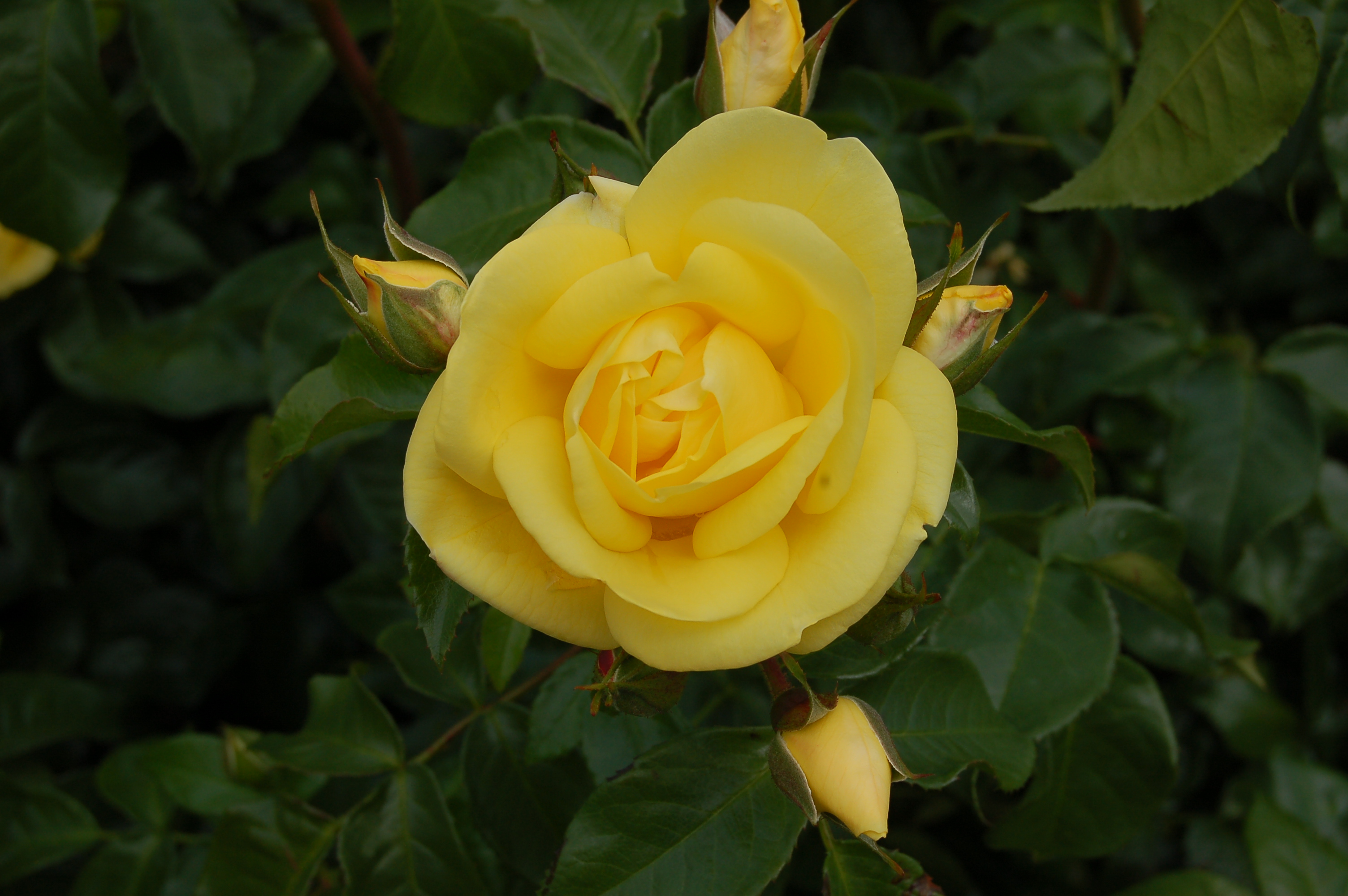 Rosa 'Emil Nolde'